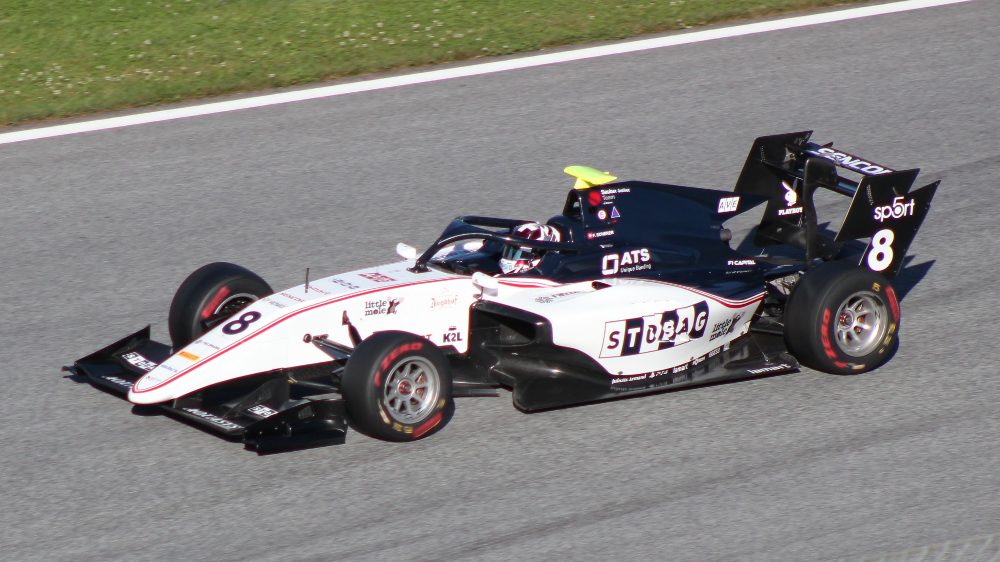 Scherer beim Rennwochenende in Österreich 2019